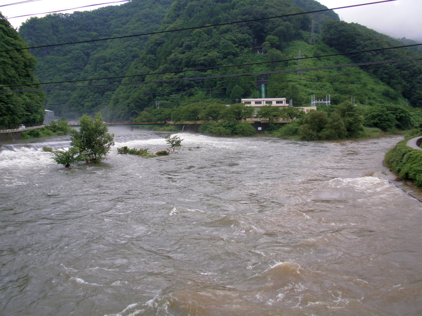 岡山県新見市の高梁川本川（右側）と西川（左側、本郷川とも）の合流点。中央の建物は新見発電所。